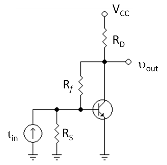 Bipolar transresistance amplifier